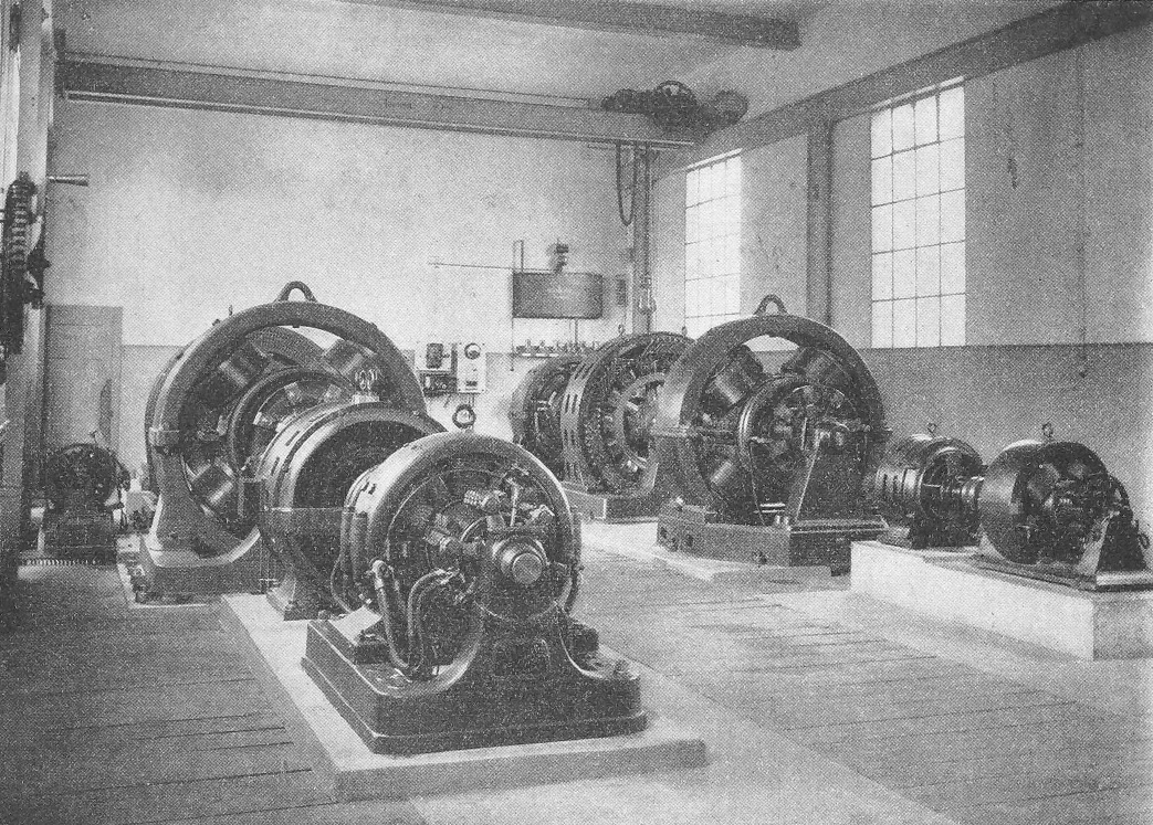 Versuchsbetrieb Seebach-Wettingen: Innenansicht der Umformerstation